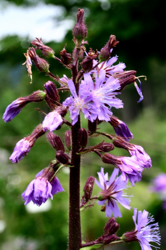 Cicerbita_alpina (Cicerbita violetta) Località Giardino Botanico Alpino "G. Lorenzoni" Tambre (BL) 1000 m s.l.m. (agosto 2007)